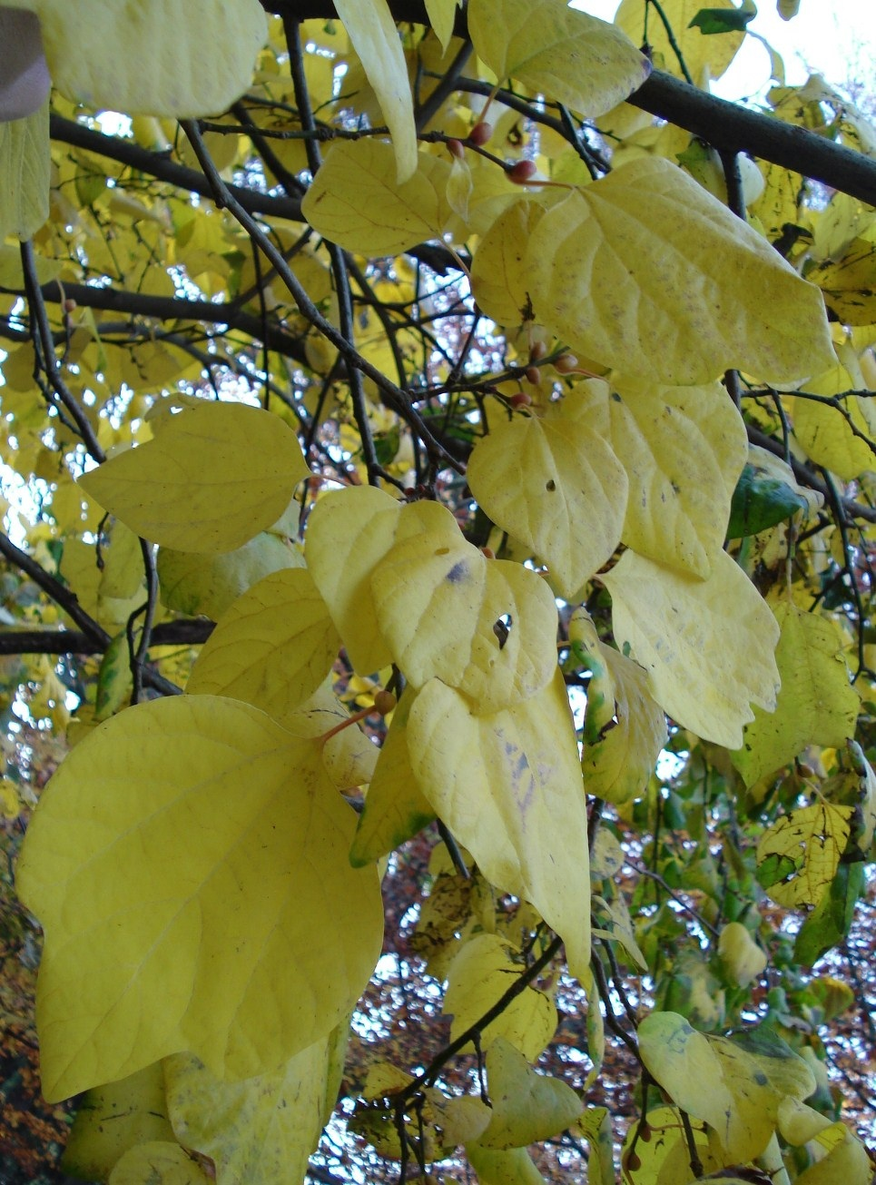 Lindera obtusiloba - leaves